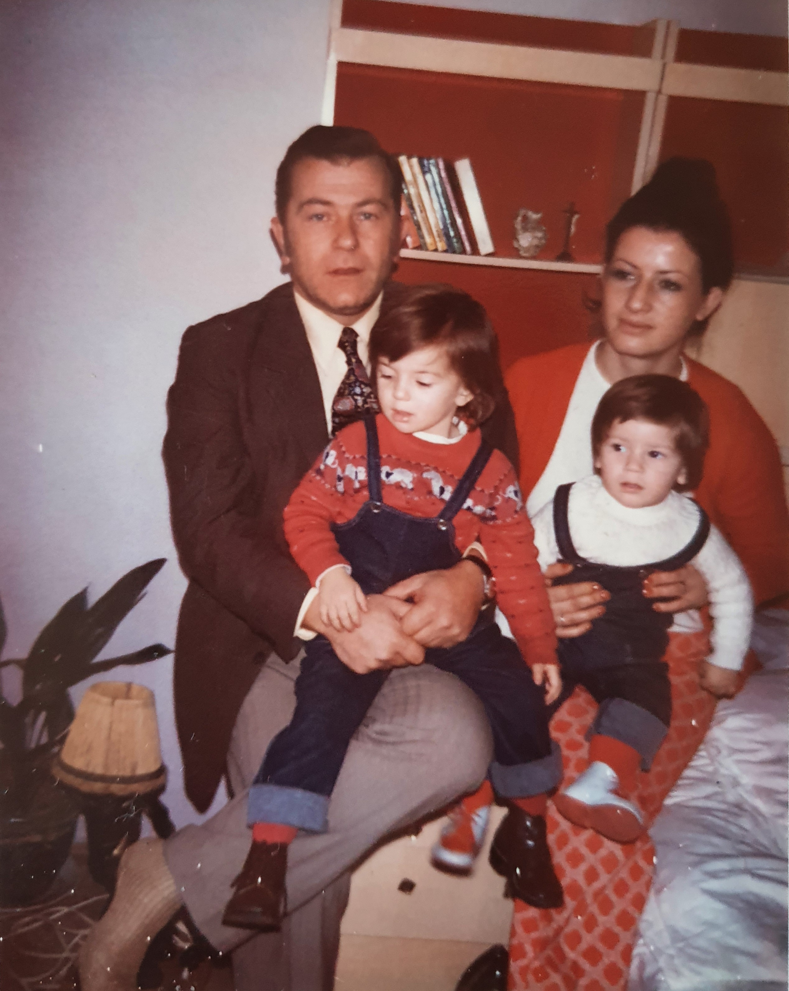 Mark Kacinari me bashkeshorten Roza, vajzen Donika dhe djalin Gasper. Prishtine 1973